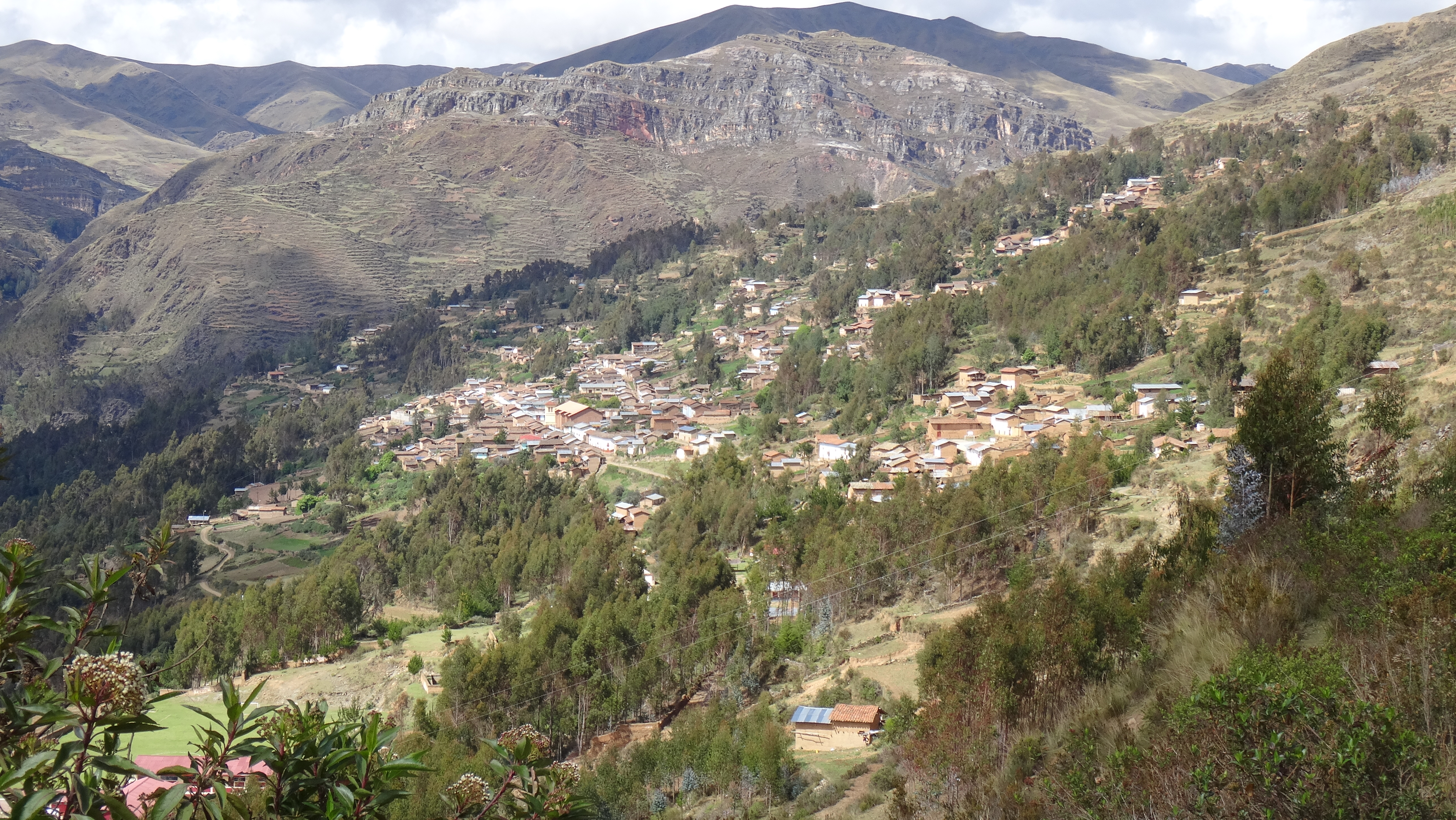 Singa, desde el camino.